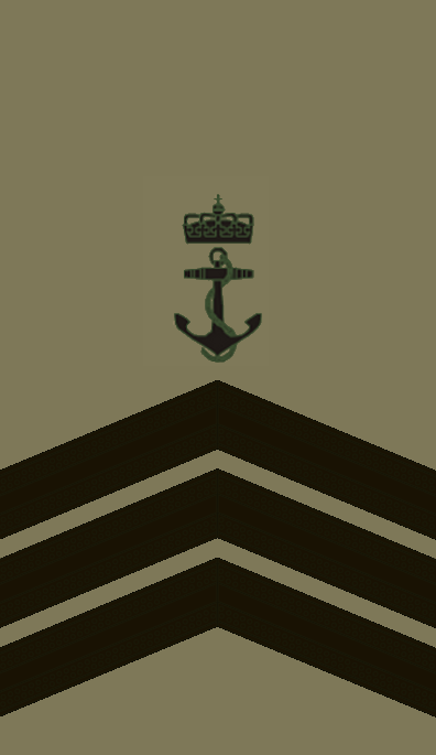 OR7 NOR - Flotiljemester